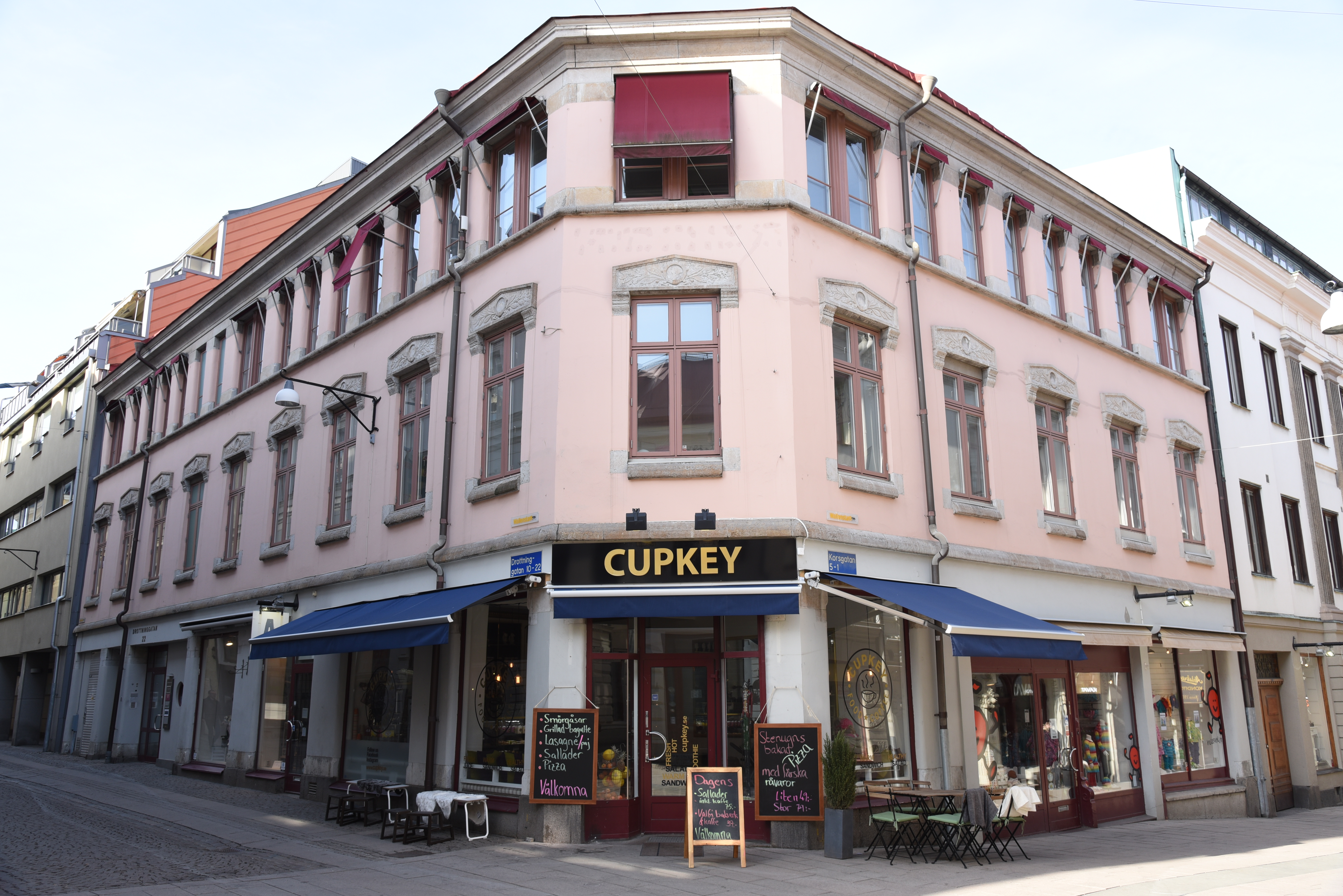 Hörnbyggnaden vid Drottninggatan 22 och Korsgatan 5 i kvarteret Kommerserådet i stadsdelen Inom Vallgraven i Göteborg. Byggnaden uppfördes år 1806 för handelsman S Borgman.